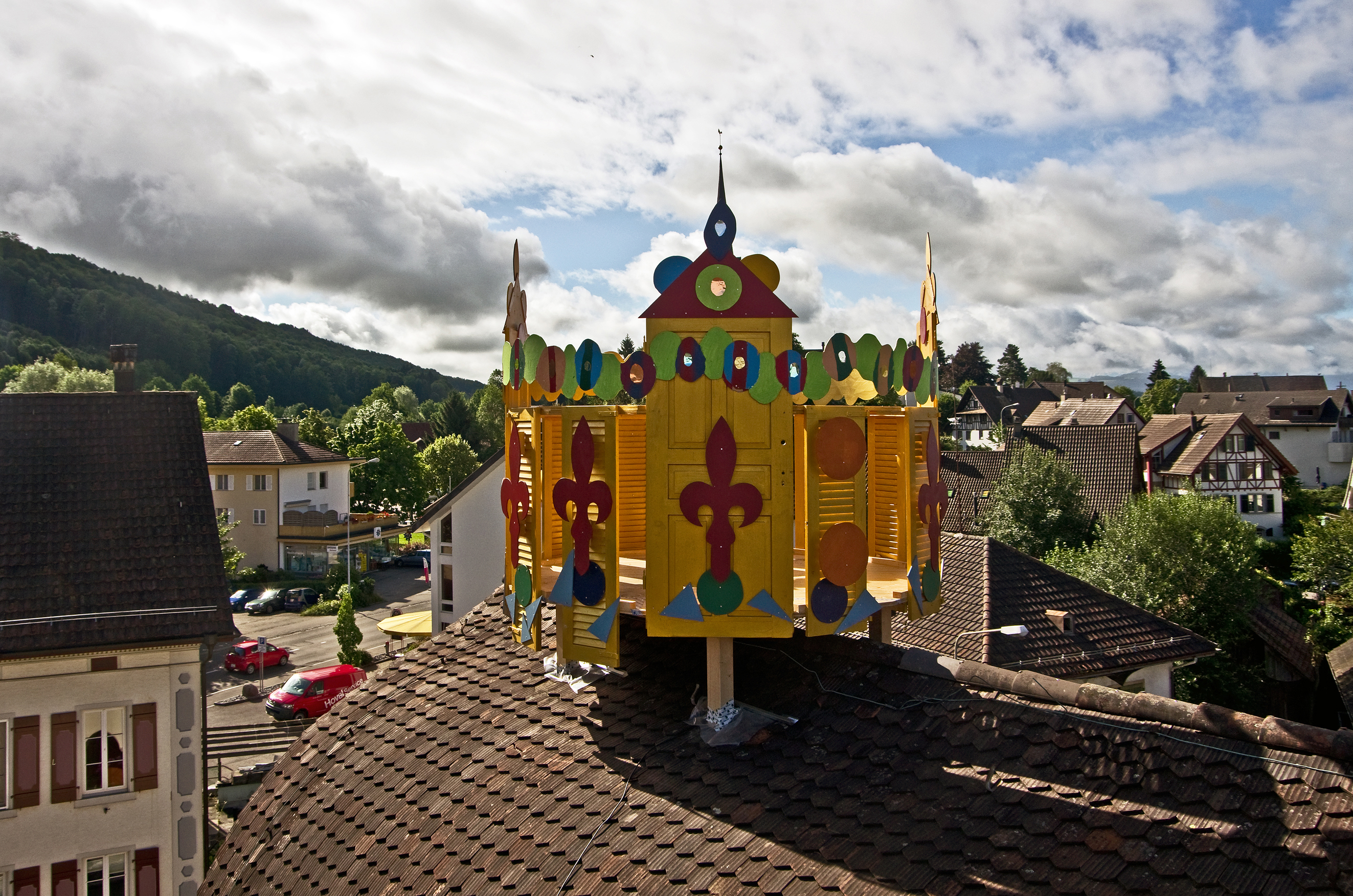 Hanswalter Graf, Bauhausen, 2012